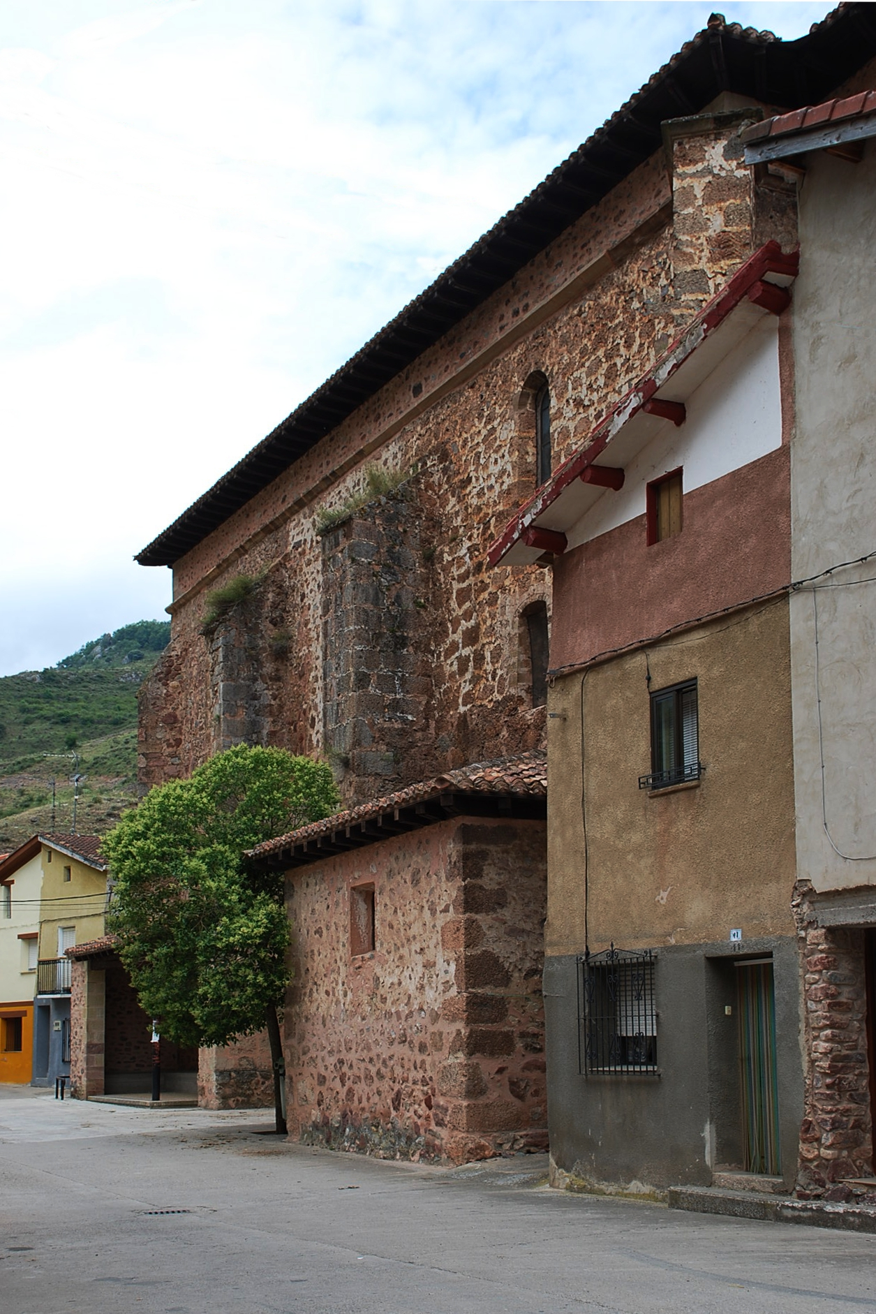 Calle de Tobía en La Rioja (España)